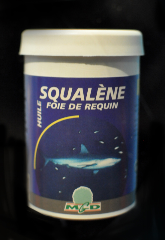 Shark liver oil